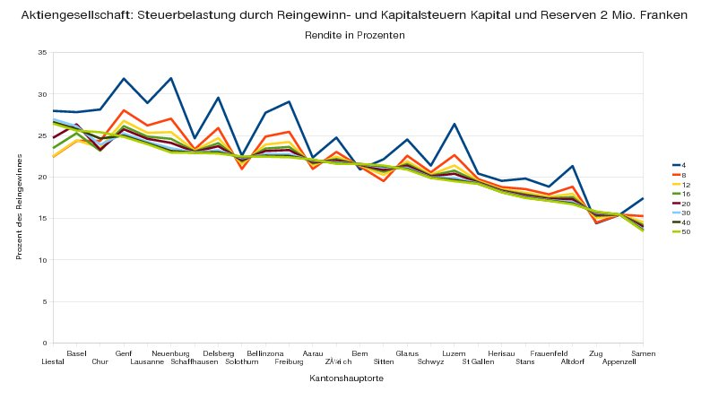 Steuerwettbewerb in der Schweiz: Aktiengesellschaft Kapital und Reserven 2000K Franken - Reingewinn- und Kapitalbelastung durch Kantons-, Gemeinde- und Kirchensteuern sowie direkte Bundessteuer insgesamt in Prozenten des Reingewinnes 2007 Quelle: Steuerbelastung in der Schweiz, Kantonshauptorte und Kantonsziffern 2007, ESTV